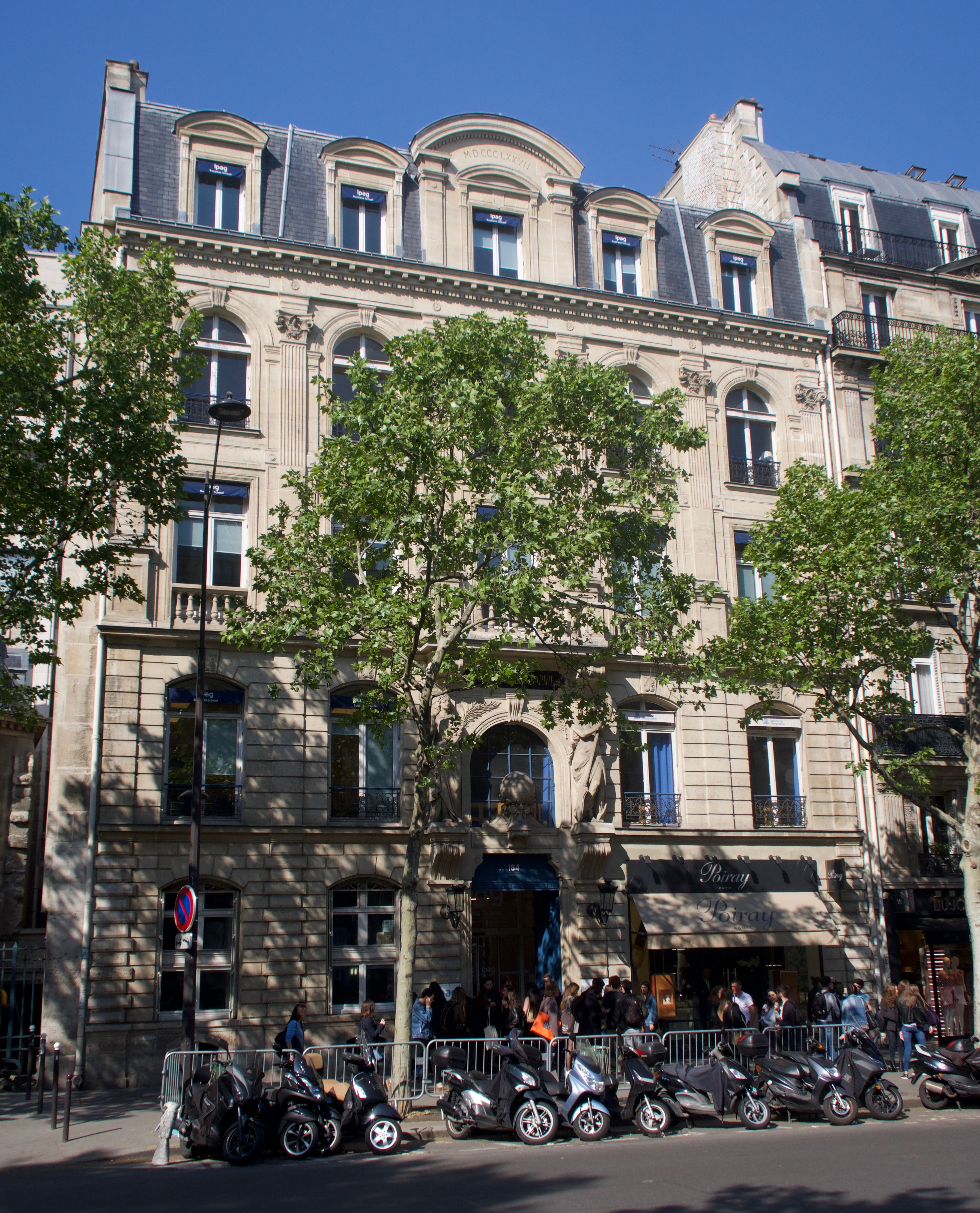 Société de Géographie, 184 boulevard Saint-Germain, Paris. Immeuble construit en 1878 par l'architecte Édouard Leudière pour la Société de géographie.